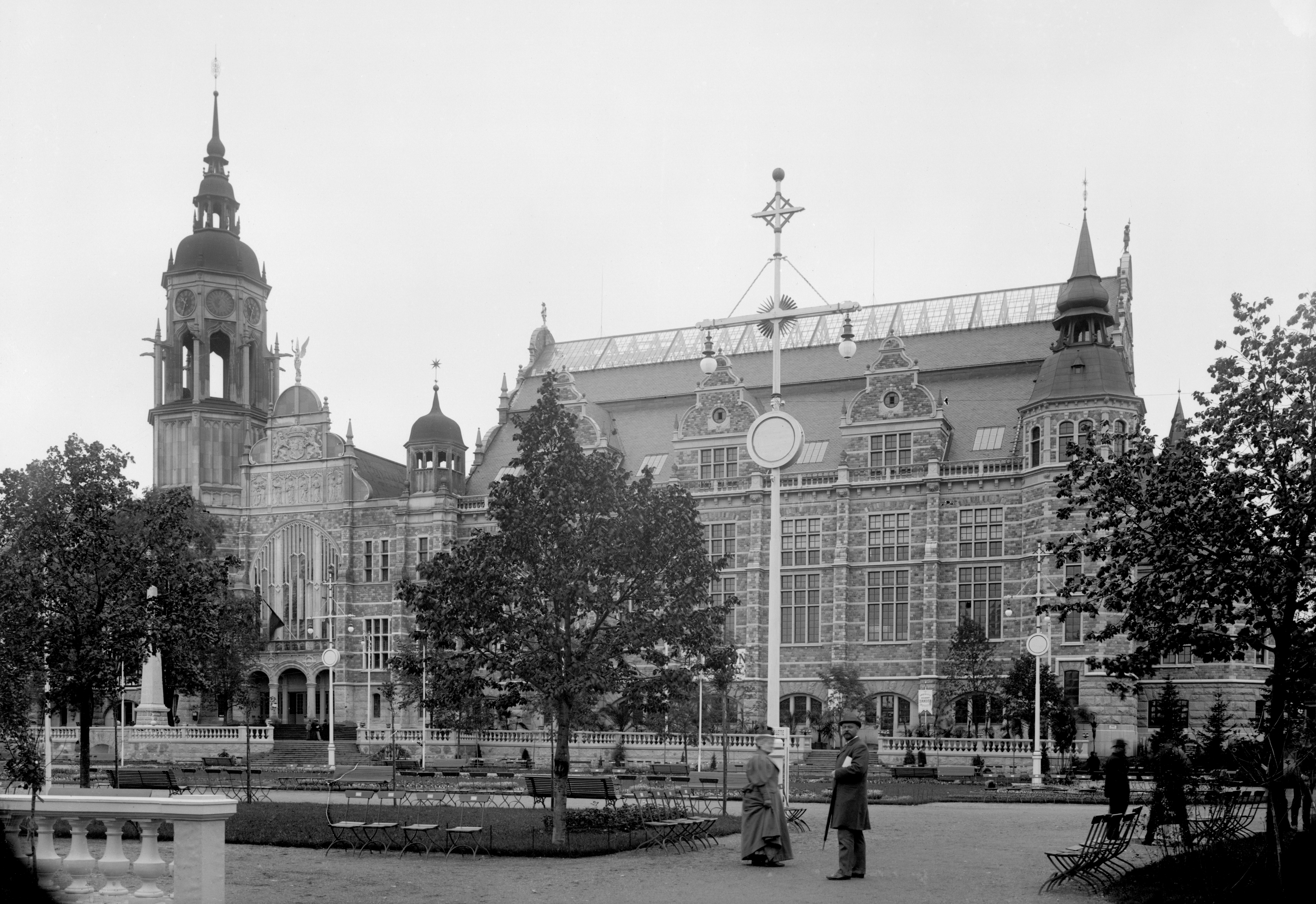 "Nordiska museet" i Stockholm, Djurgården, år 1897